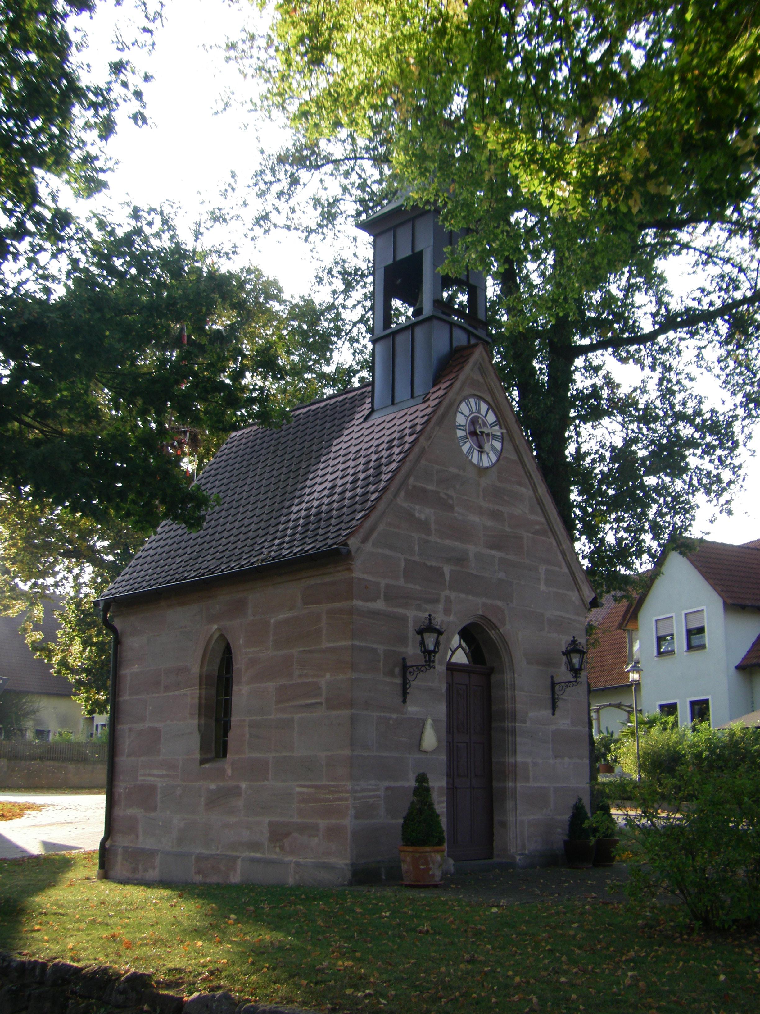 Marienkapelle in Winkelhaid (Windsbach)